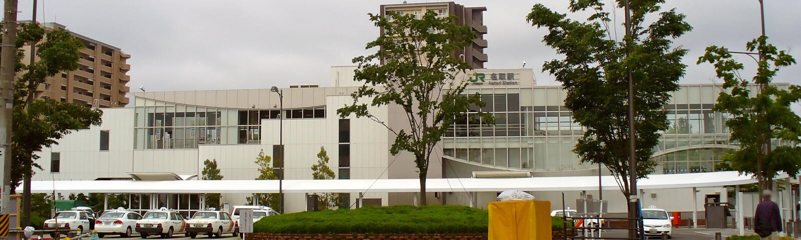 名取駅（東口）